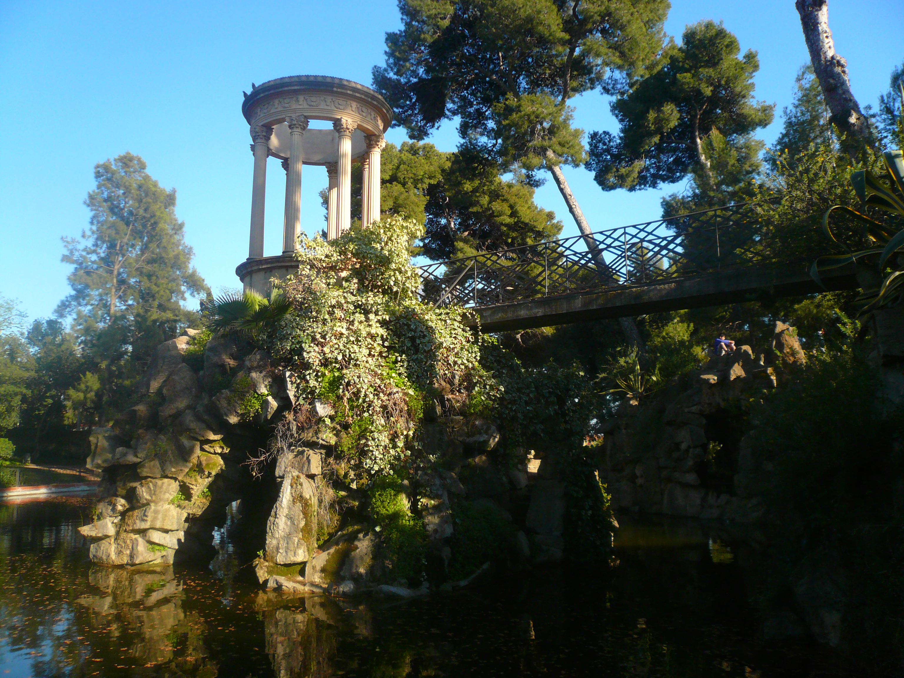 Templet al Parc de Can Vidalet (Esplugues de Llobregat) Object location41° 22′ 28.17″ N, 2° 05′ 48.33″ E